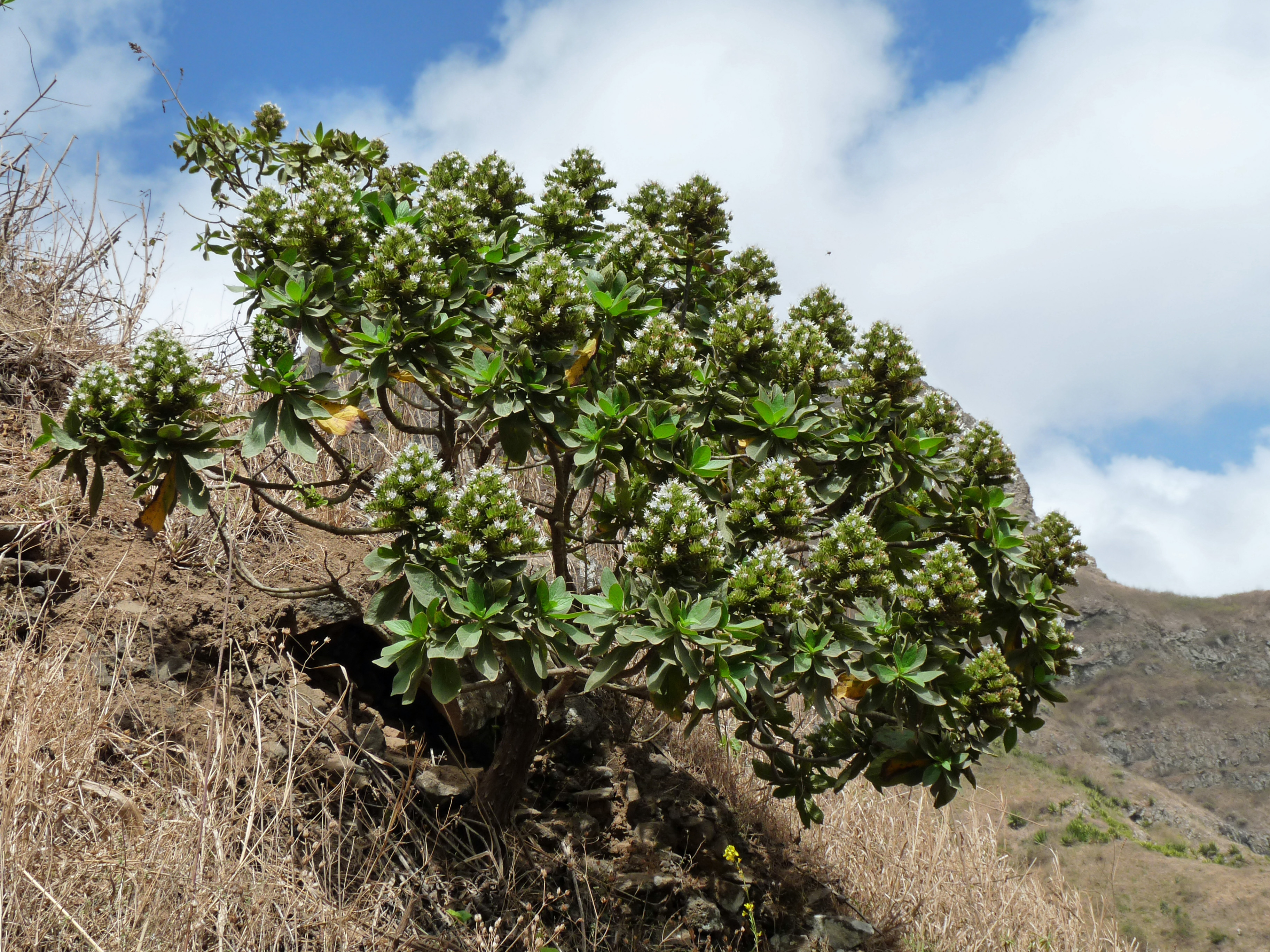 Ribeira Principal (île de Santiago, Cap-Vert) : Echium hypertropicum, espèce endémique